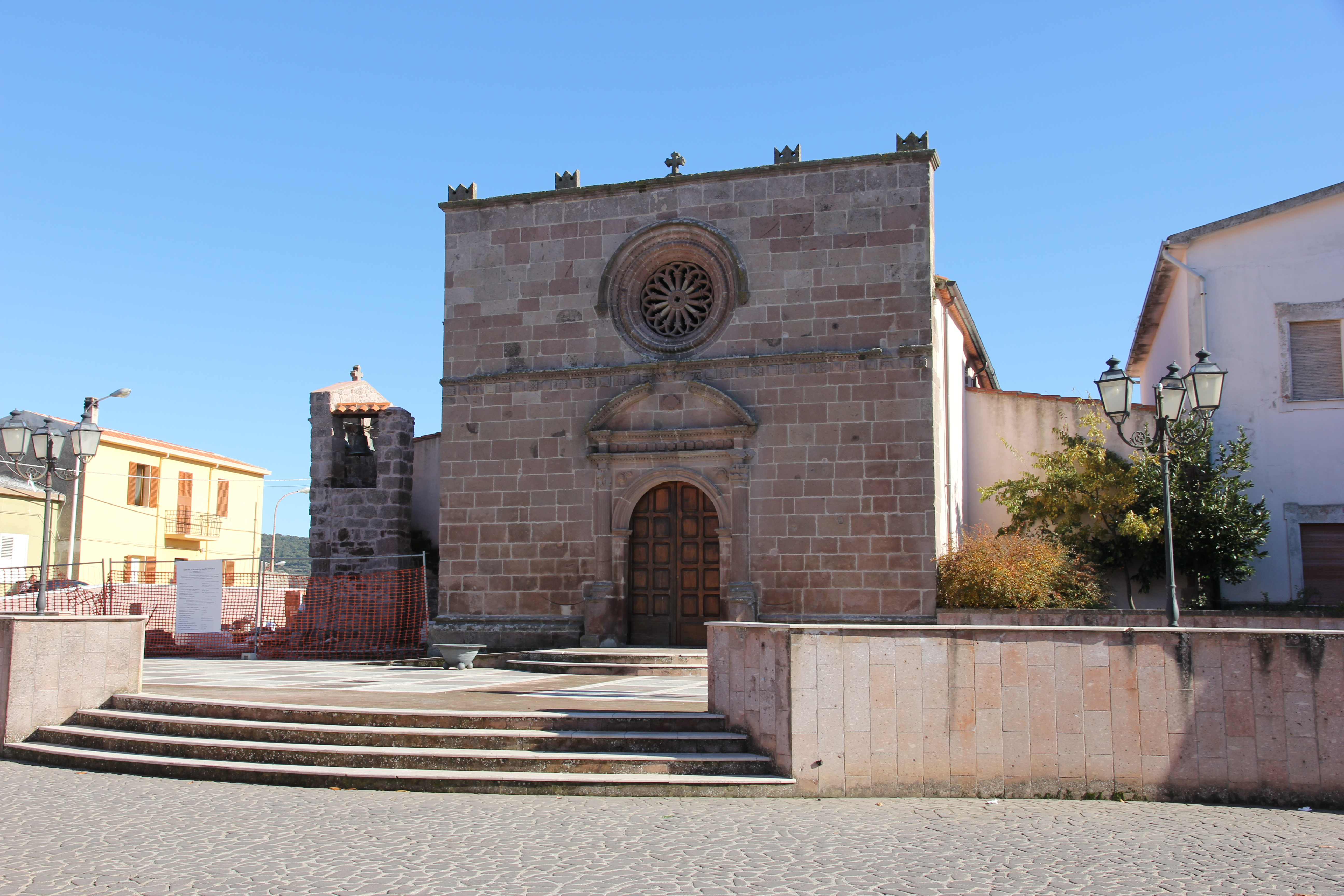 Nughedu Santa Vittoria - Chiesa di San Giacomo